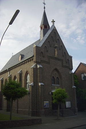 Summary Bildbeschreibung: Kuckumer Kirche. Quelle: eigenes Foto... Fotograf/Zeichner: bodoklecksel 20:31, 25. Jun 2006 (CEST) Datum: Juni 2006... Sonstiges: ...